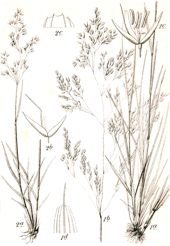 1: Agrostis canina L. 2: Agrostis rupestris All. Original Caption 1. Sumpf-Straussgras, Agrostis canina L. 2. Felsen-Straussgras, A. rupestris All.